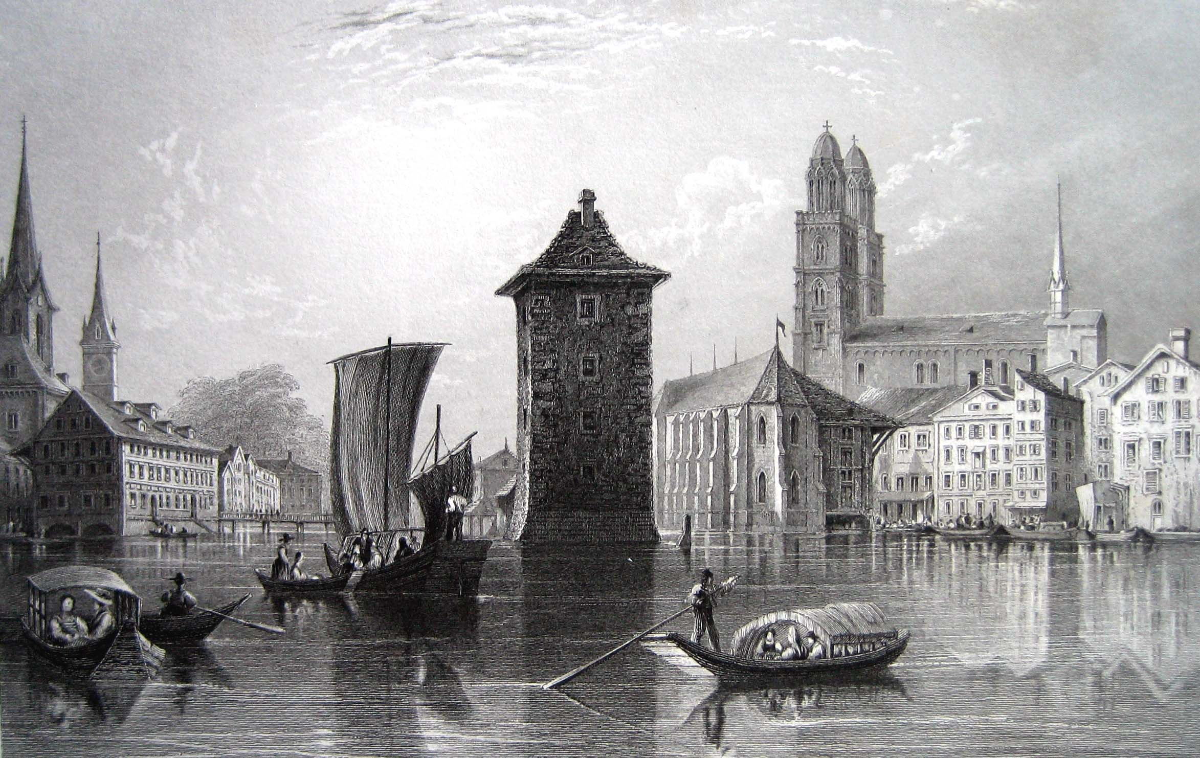 Zürich um 1834, Stahlstich von Henry William Bartlett (1828 - 1854). In der Mitte der Wellenbergturm, abgebrochen 1837, rechts Wasserkirche und Grossmünster, links das Kaufhaus, abgebrochen 1898